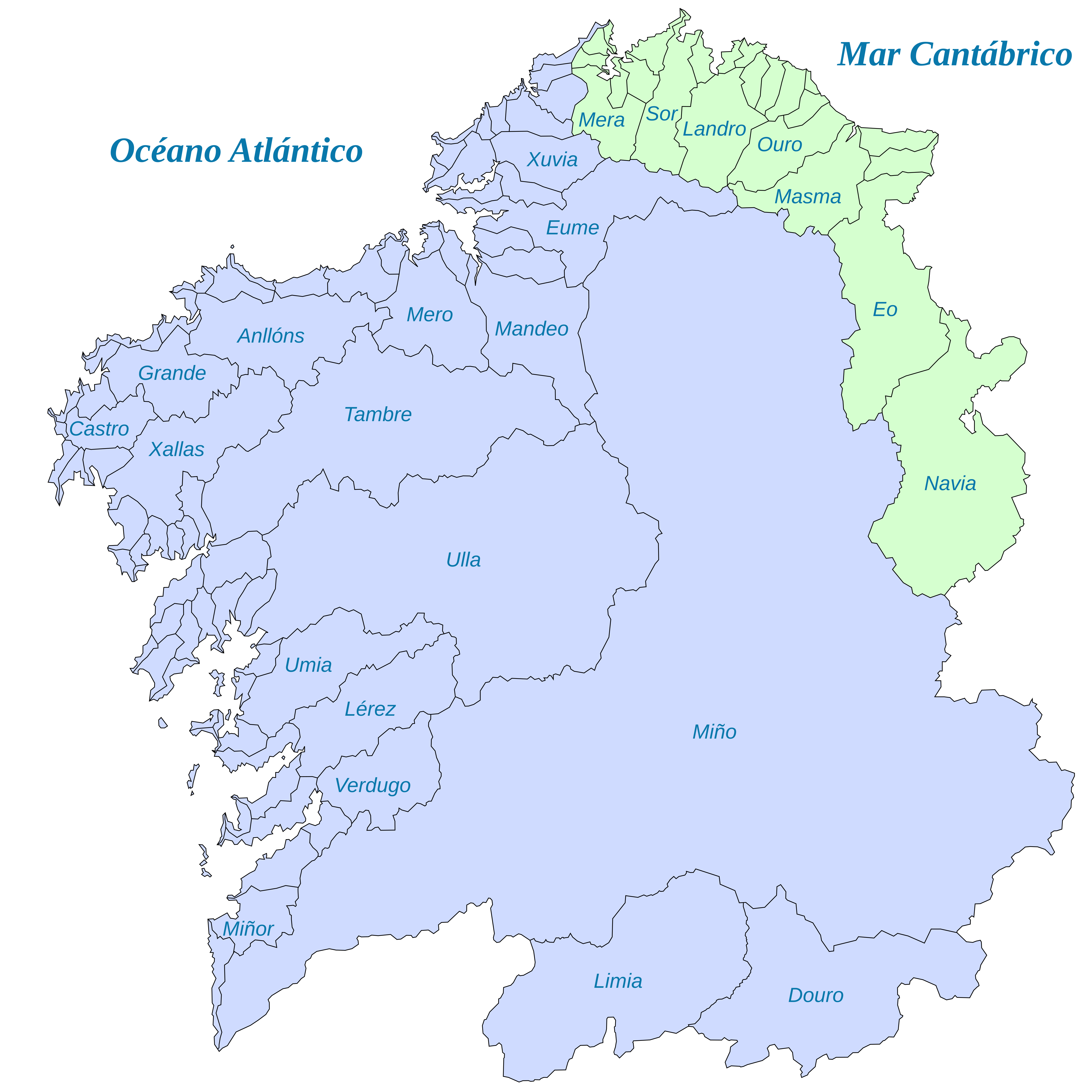 Cuncas dos principais ríos de Galicia. En verde os da vertente cantábrica, en azul os da atlántica. Versión galega. Referencias: Mapa Topográfico Nacional 1:25.000 Atlas de Galicia 1982 Gran Enciclopedia Galega O mapa foi creado en Inkscape en formato SVG. Esta é unha versión raster en PNG.